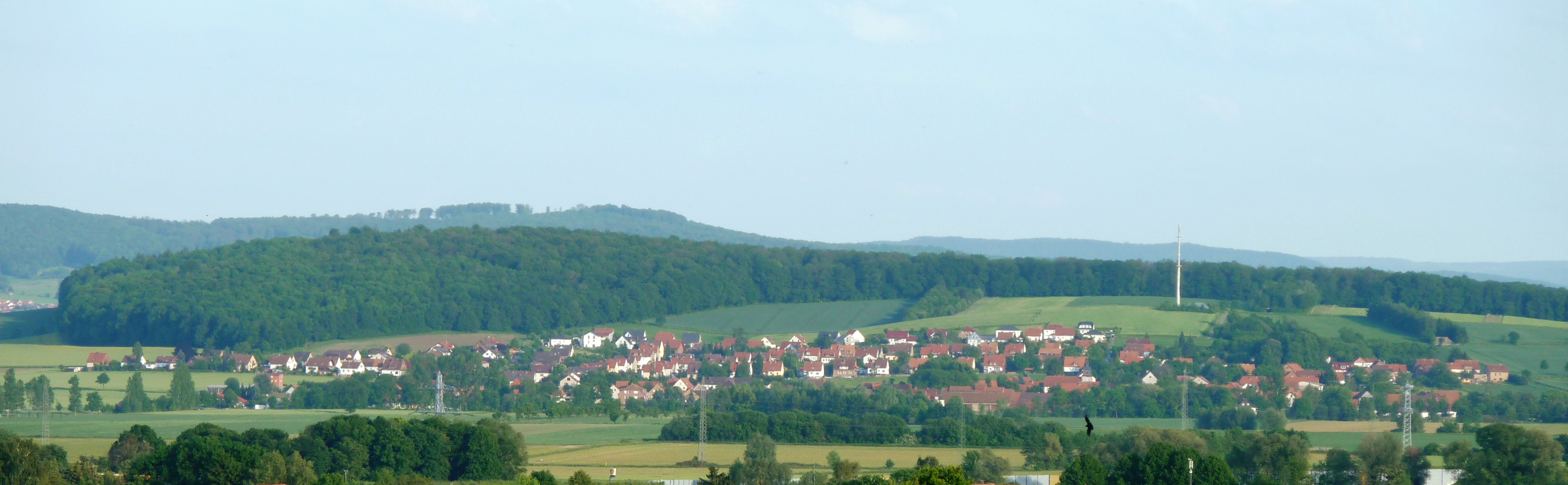 Blick von Nordnordwesten auf Sieboldshausen, Gemeinde Rosdorf, Südniedersachsen. Hinter dem Ort der bewaldete Jägerberg und Henkeberg